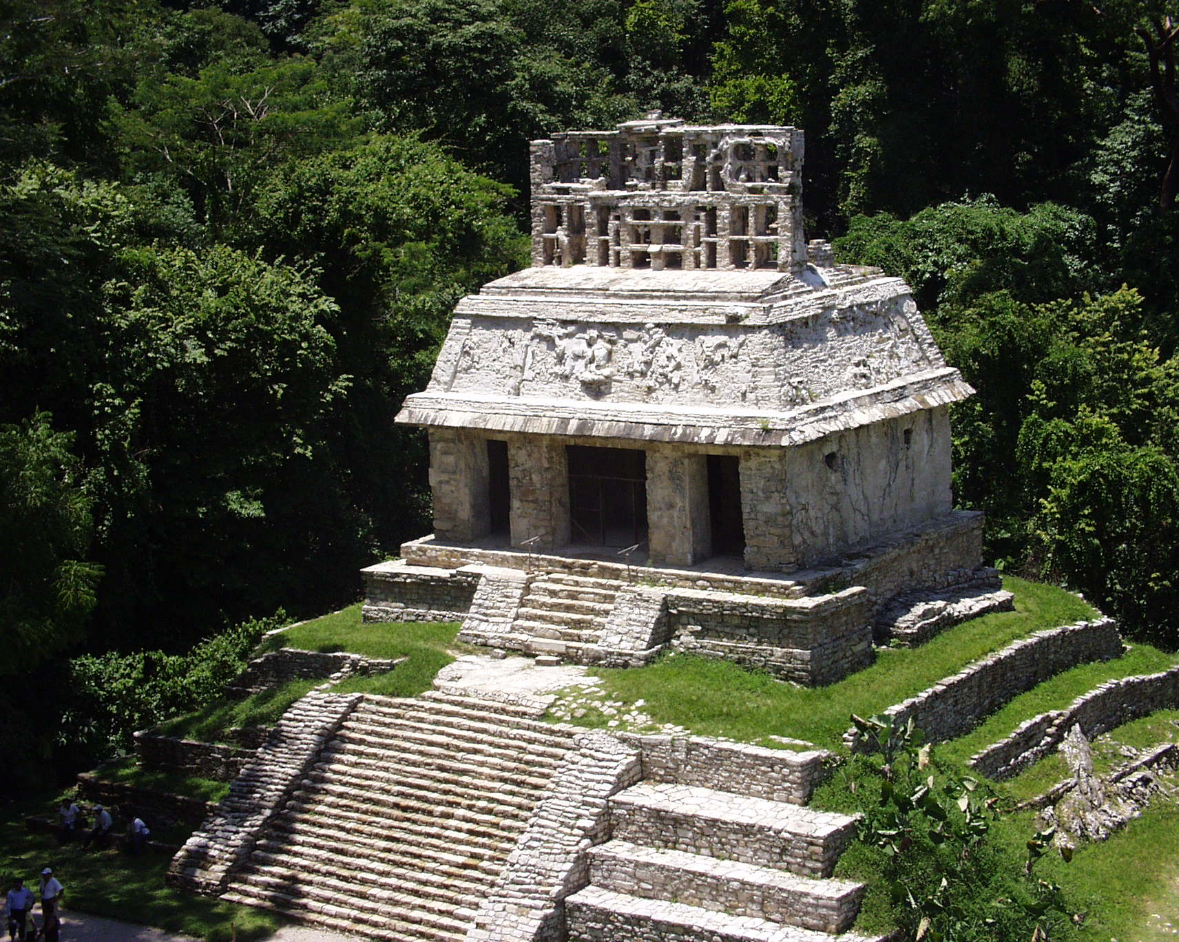 Site archéologique de Palenque. Templo del Sol